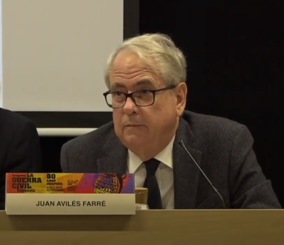 La Guerra Civil en el panorama internacional durante y después. Congreso La Guerra Civil Española: 27, 28 y 29 de noviembre de 2019.